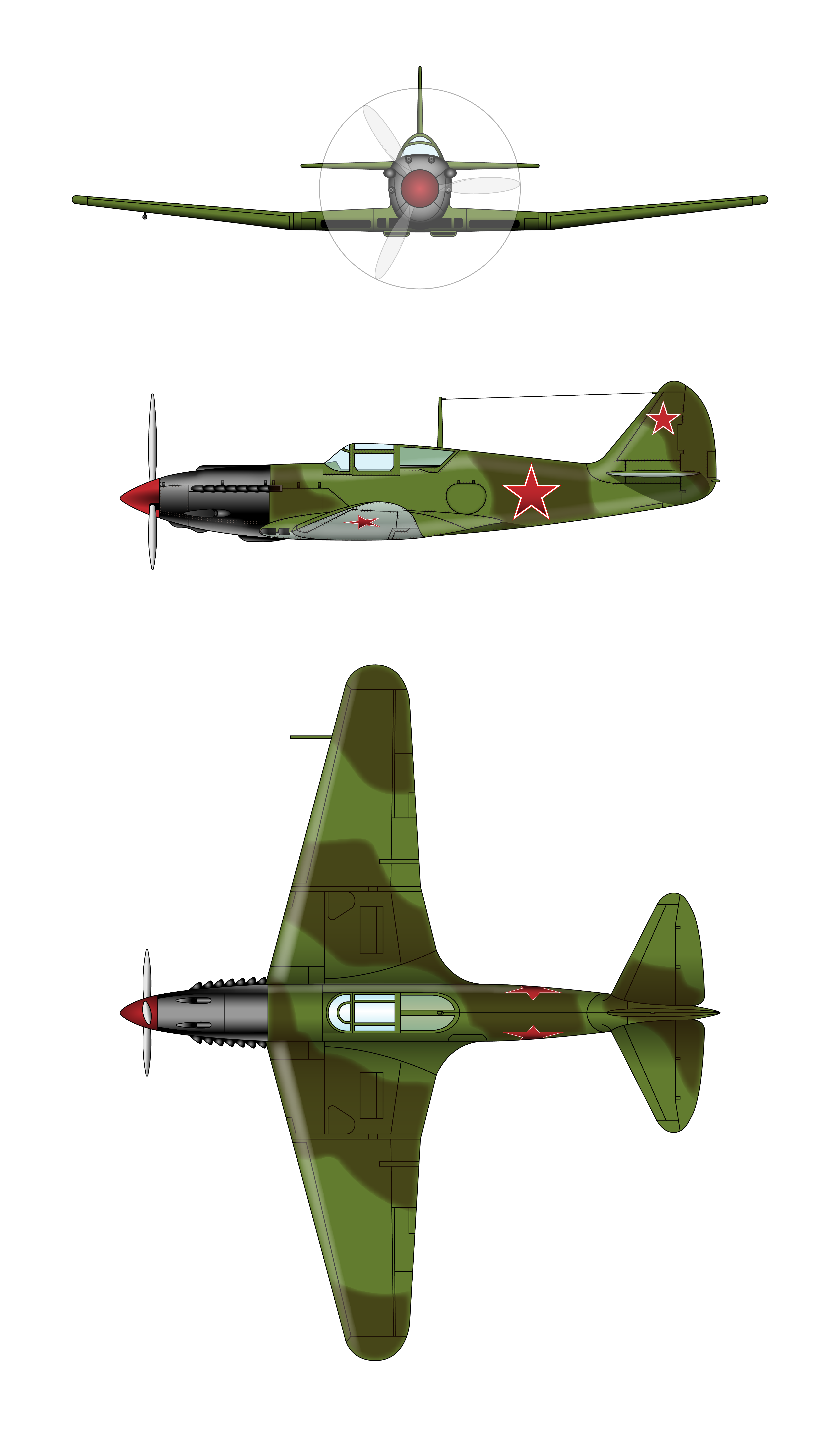 Mikoyan-Gurevich MiG-11 (I-220)